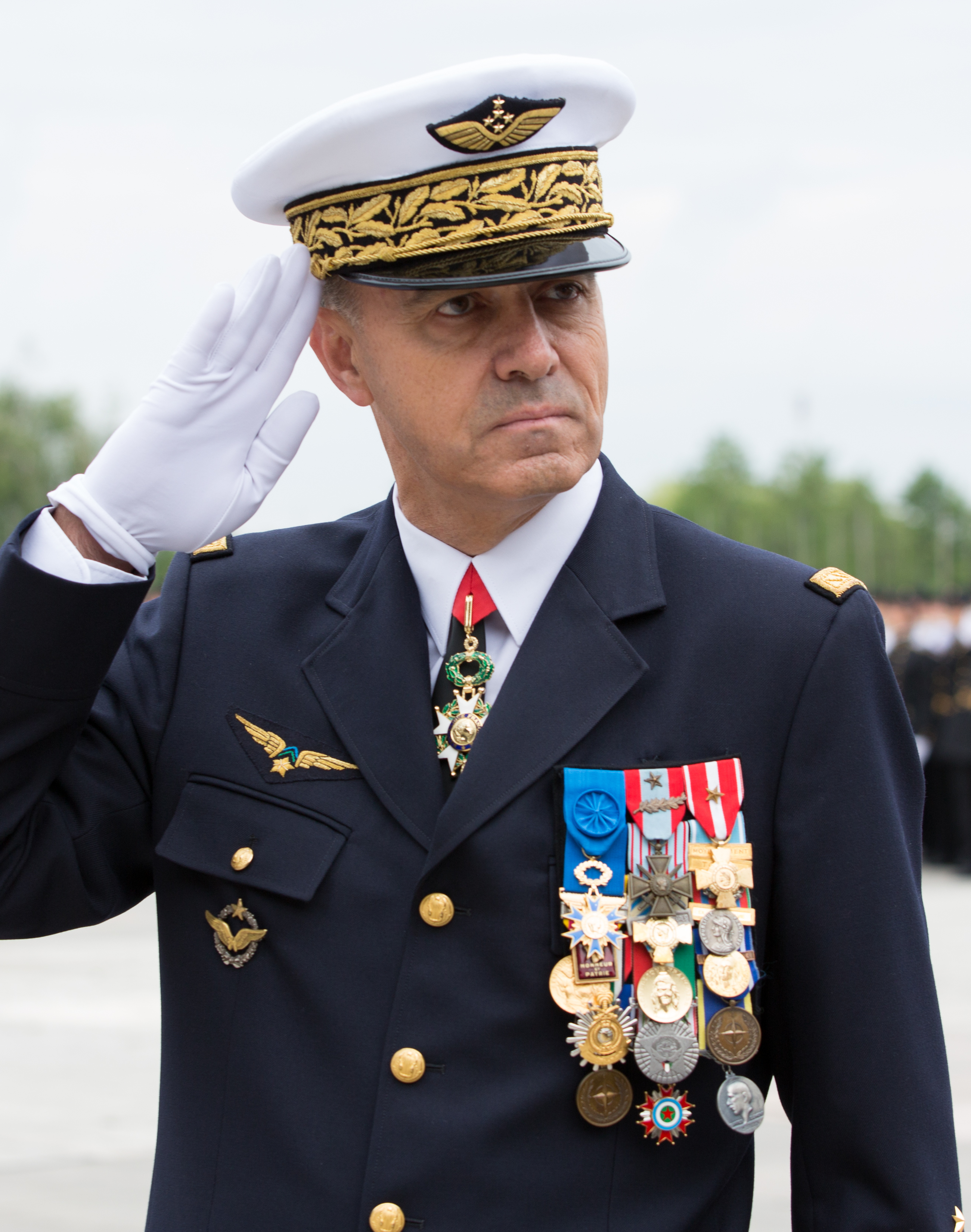 Le général d'armée aérienne André Lanata, chef d'état-major de l'armée de l'air , en 2016.